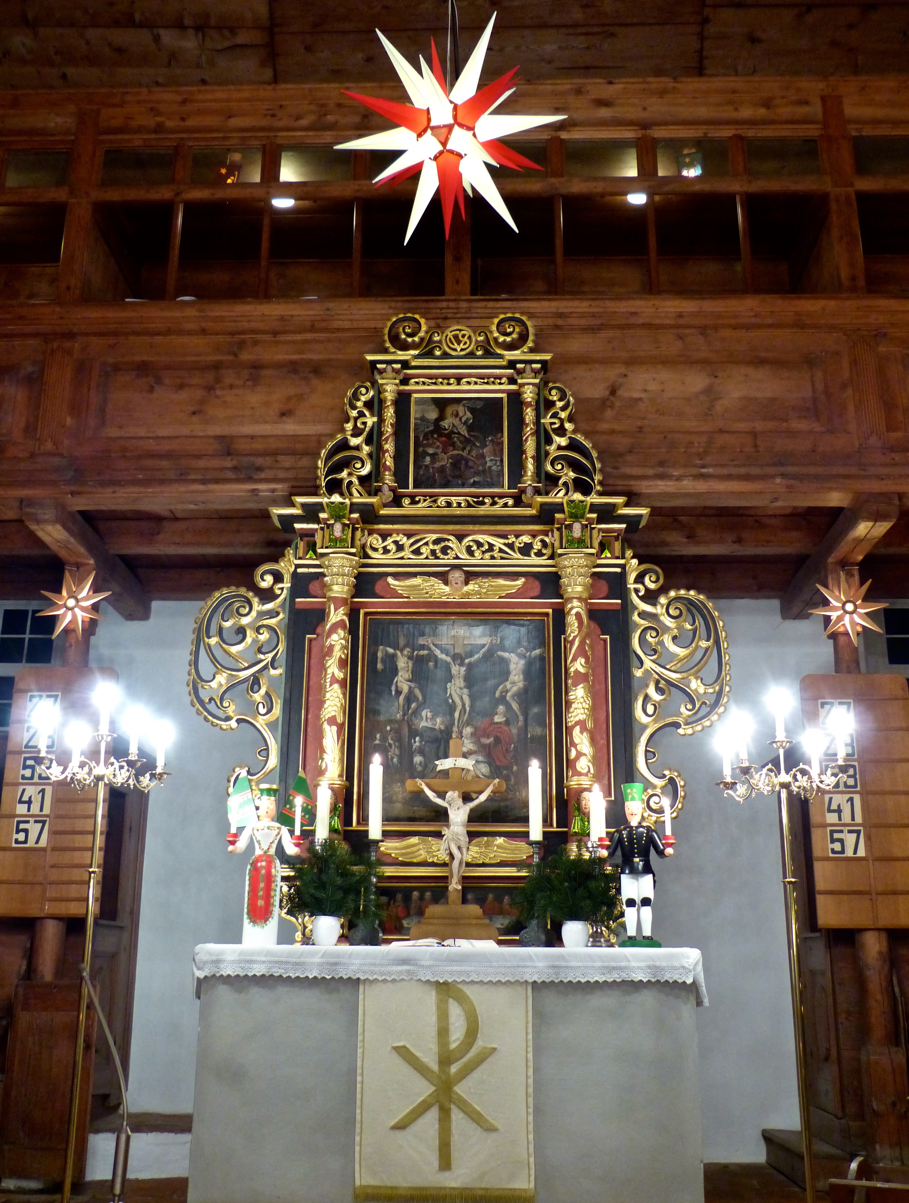 Exulantenkirche Oberneuschönberg - Altar mit Lichterbergmann und Engel sowie einem Adventsstern